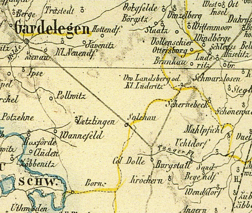 Alte Karte der Region um Salchau, Colbitz-Letzlinger Heide, Deutschland